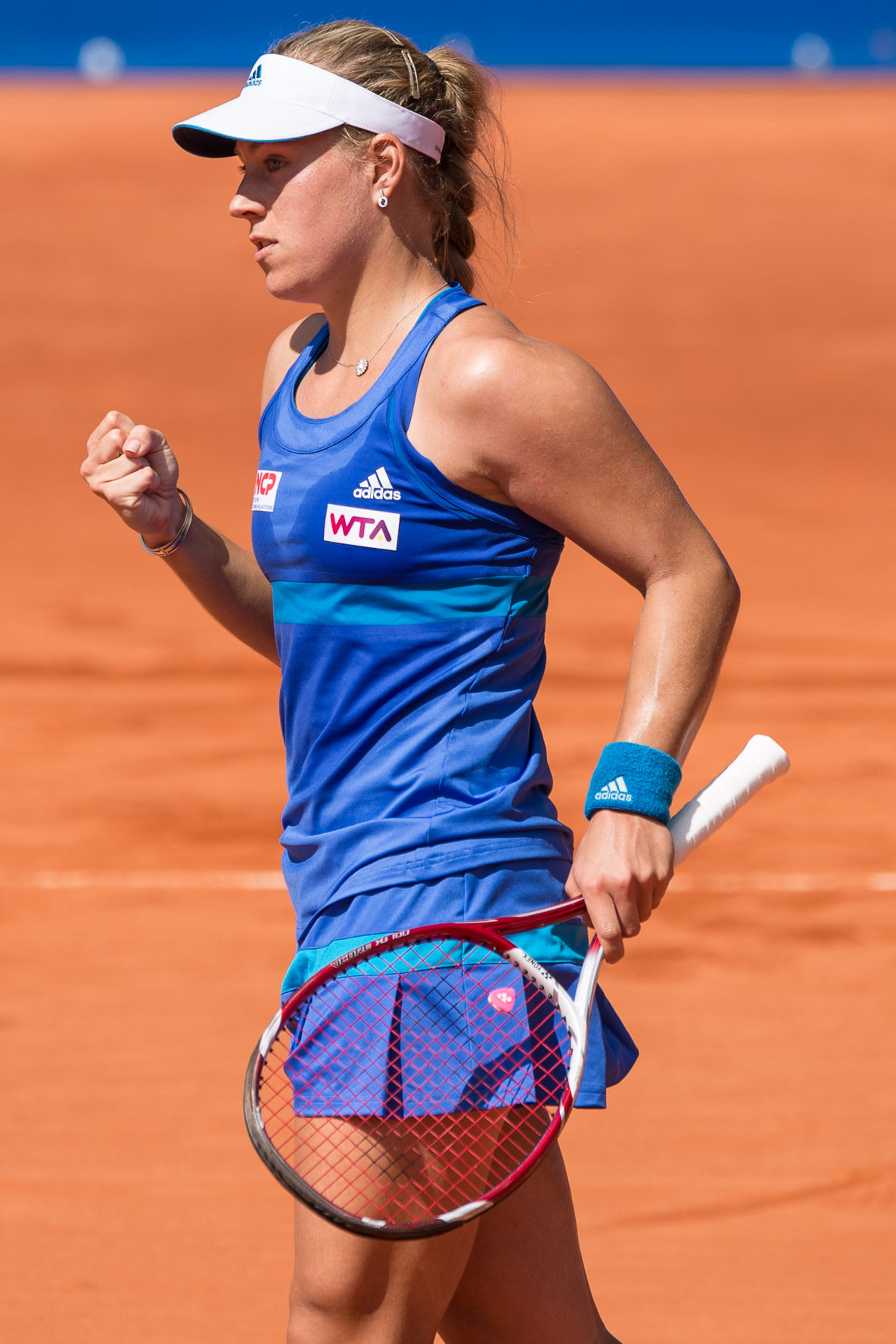 Angelique Kerber,Damentennis,Nürnberger Versicherungscup 2014,Tennis,WTA